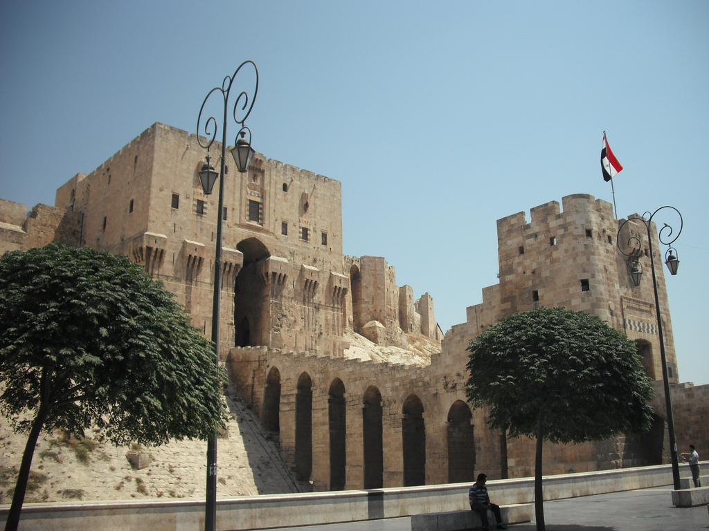 Aleppo Citadel